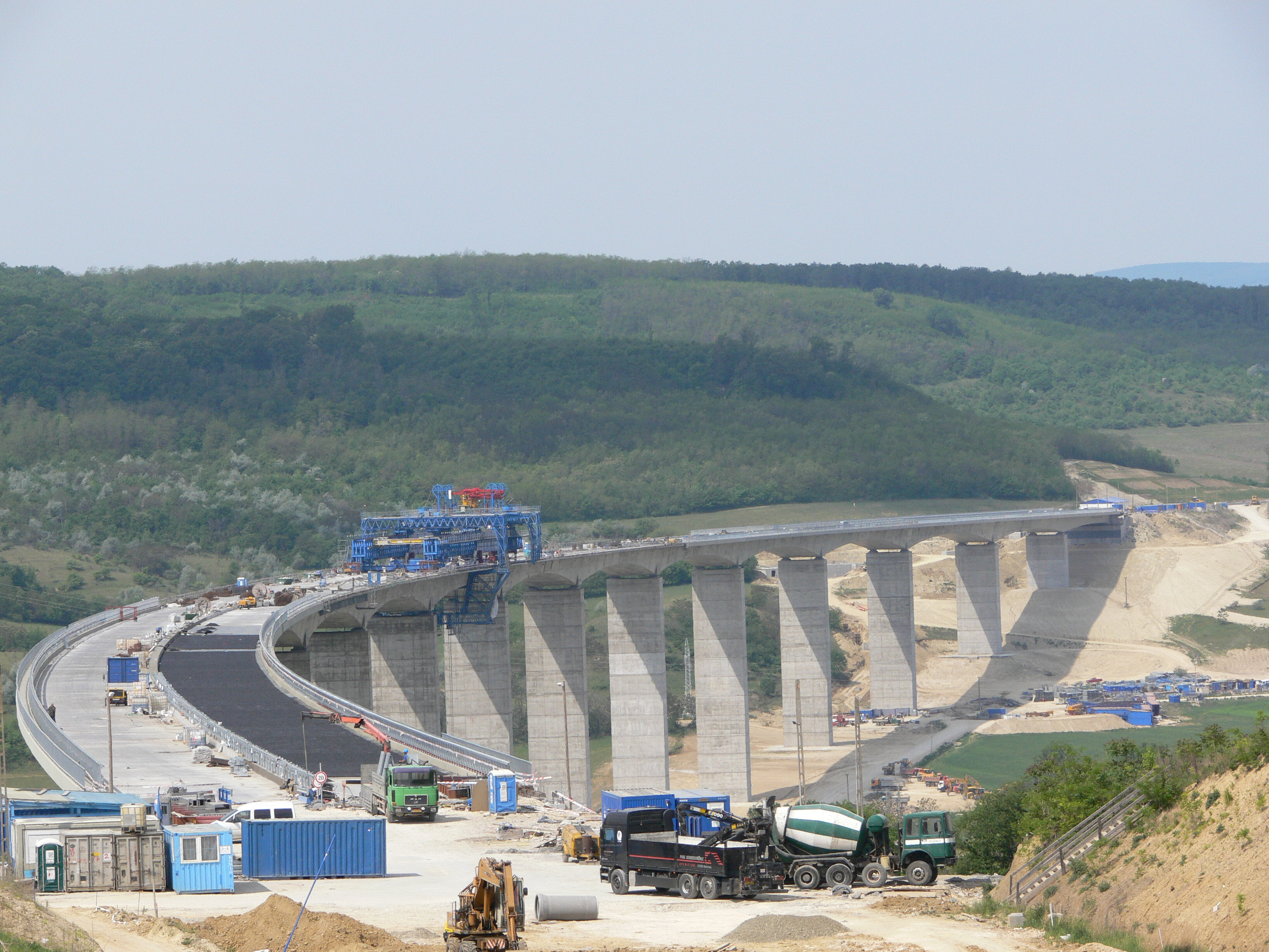 Kőröshegy, völgyhíd